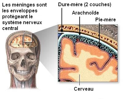 traduction de (